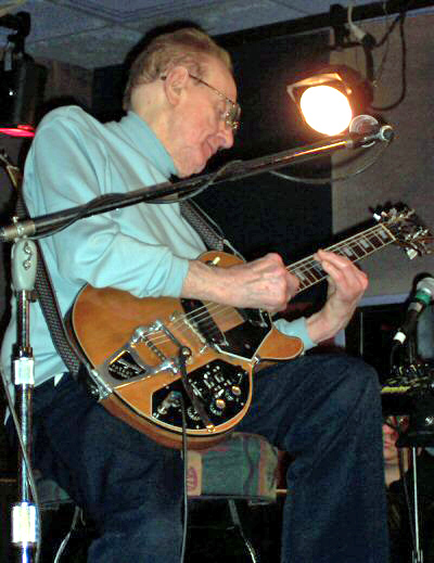 Les Paul Source:ex-Commons vum User:Didi43; opgehellt vum